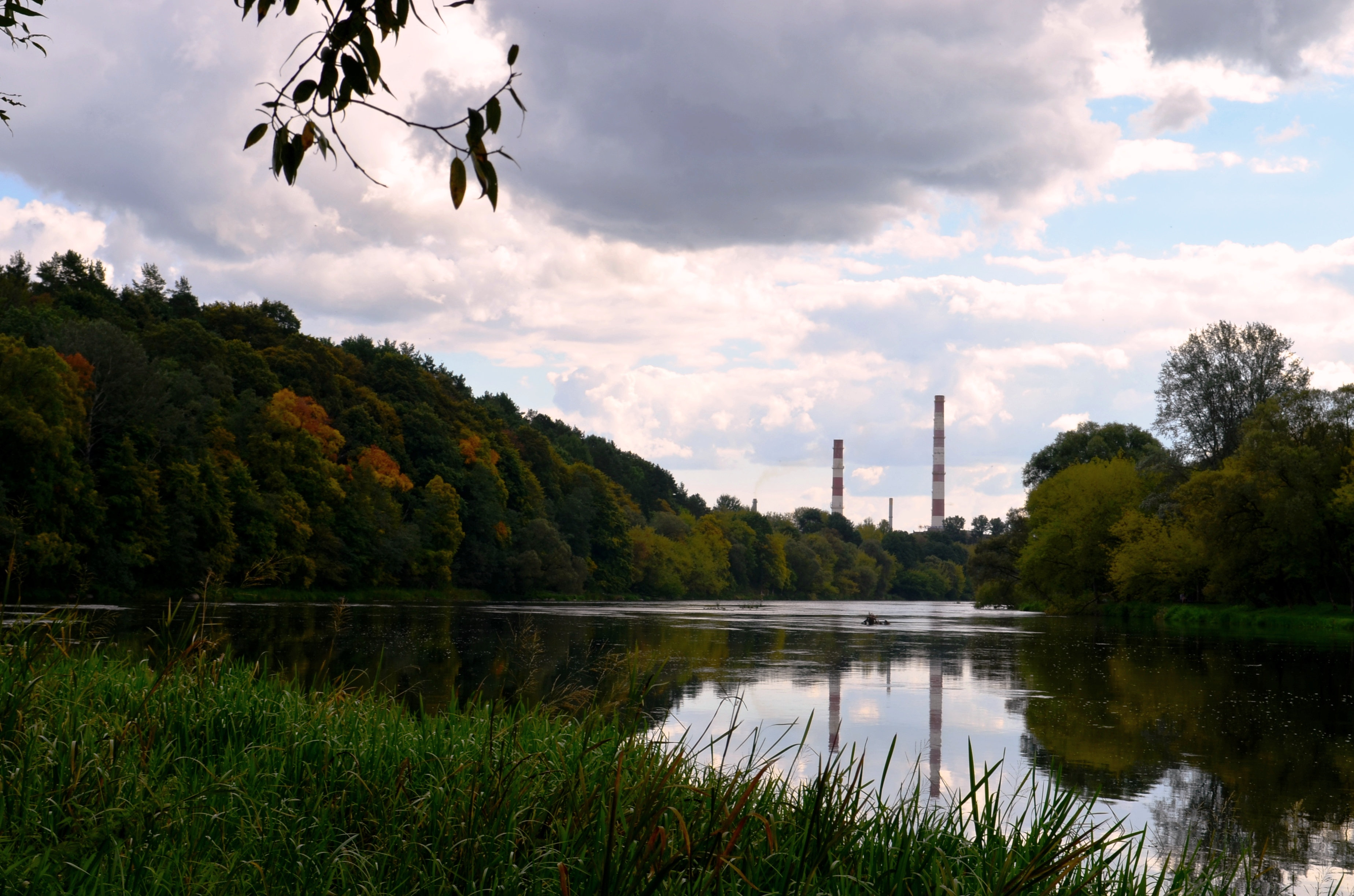 Neris ties Vingio parku, Vilnius